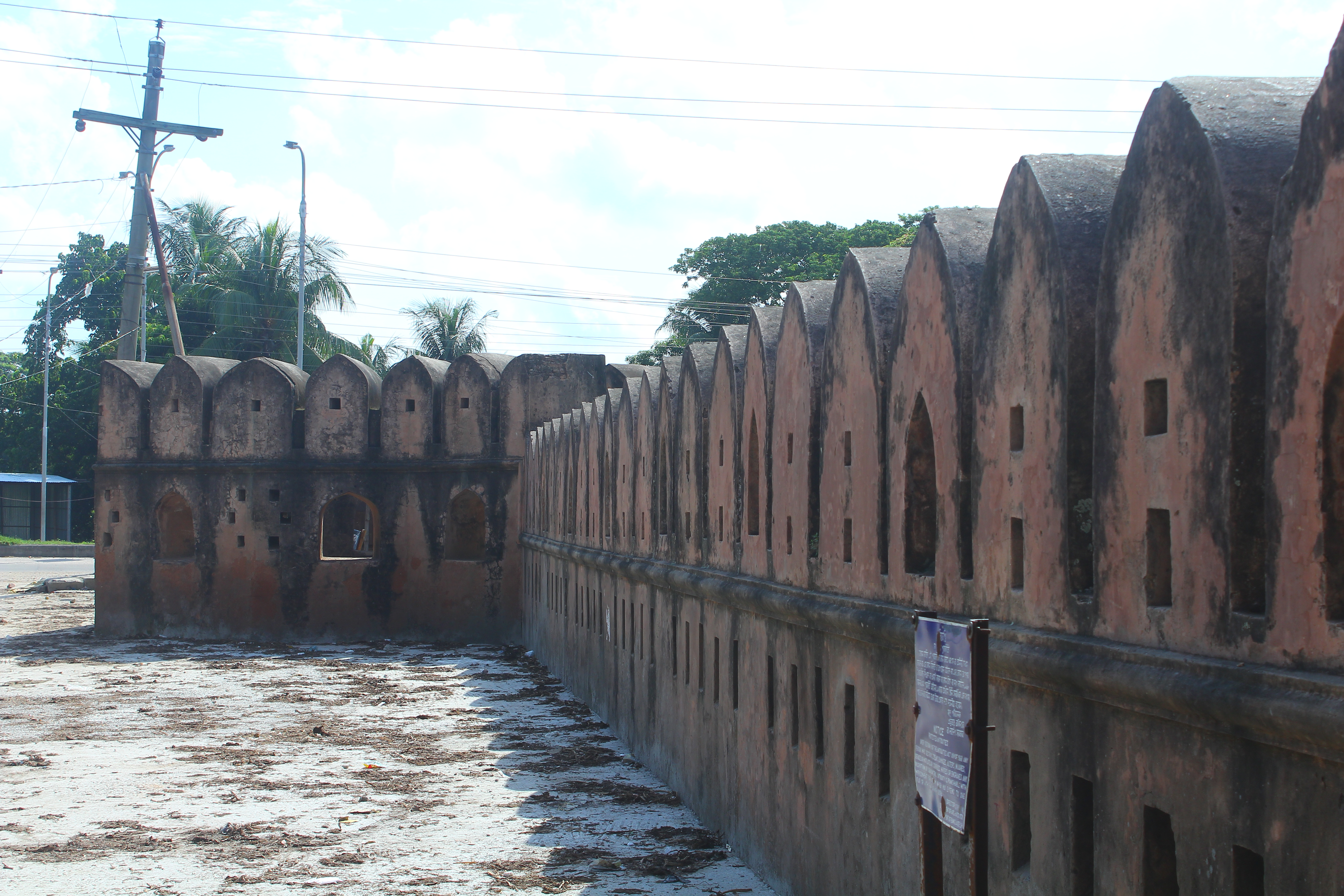 সোনাকান্দা দুর্গ